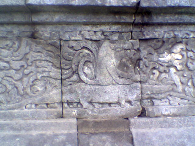 Door mij gemaakt op 16 december 2005.